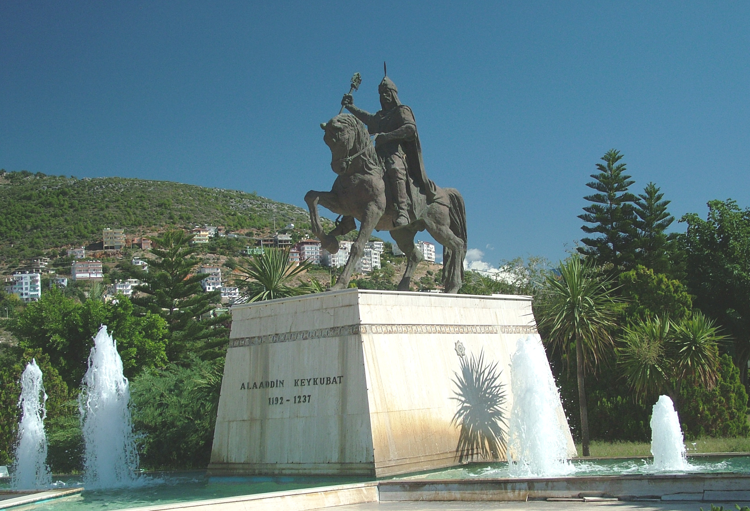 Alaaddin Keykubat szobra Alanyában (Törökország)